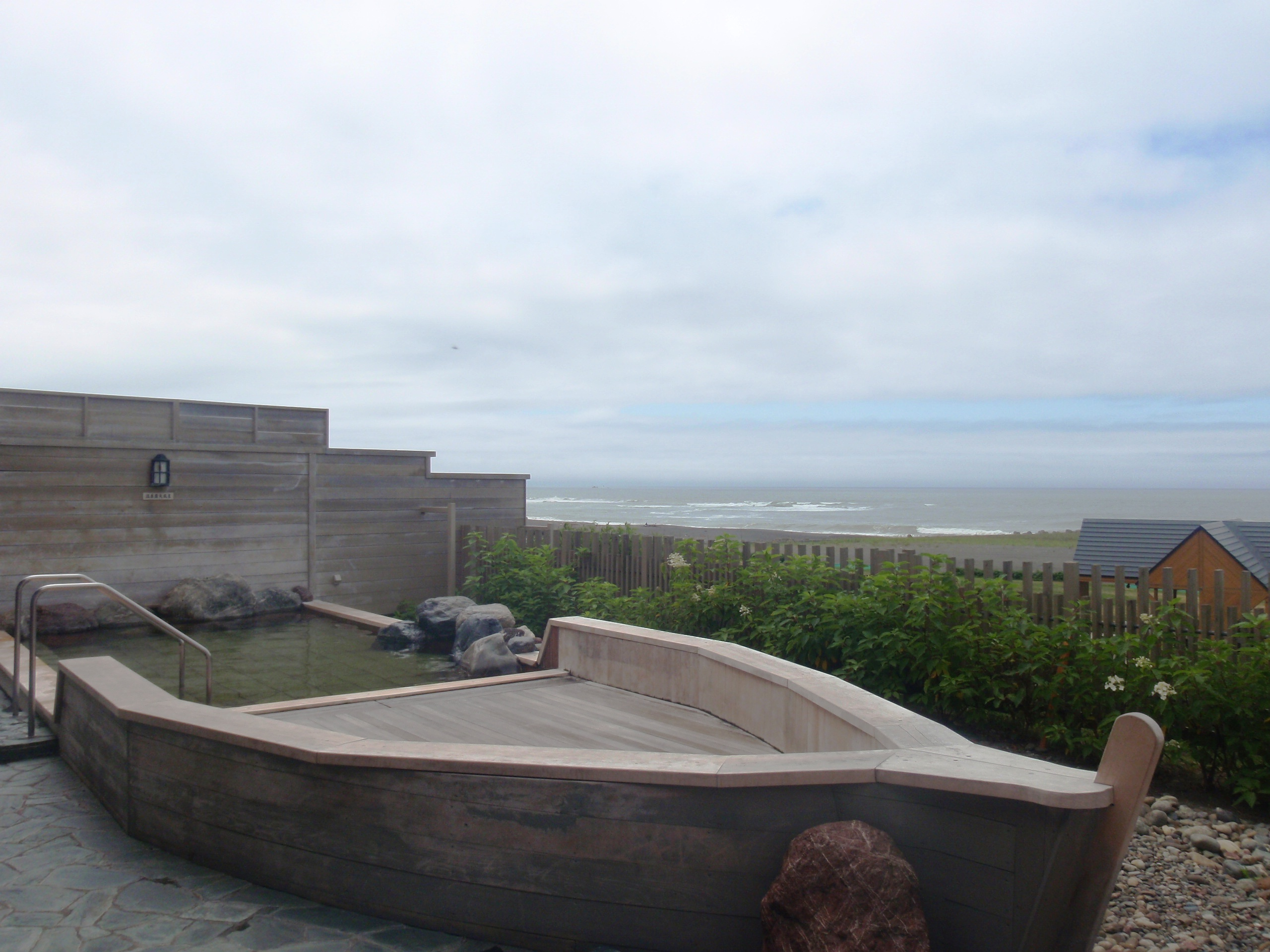 三石温泉、和船を模した露天風呂。太平洋を望む。